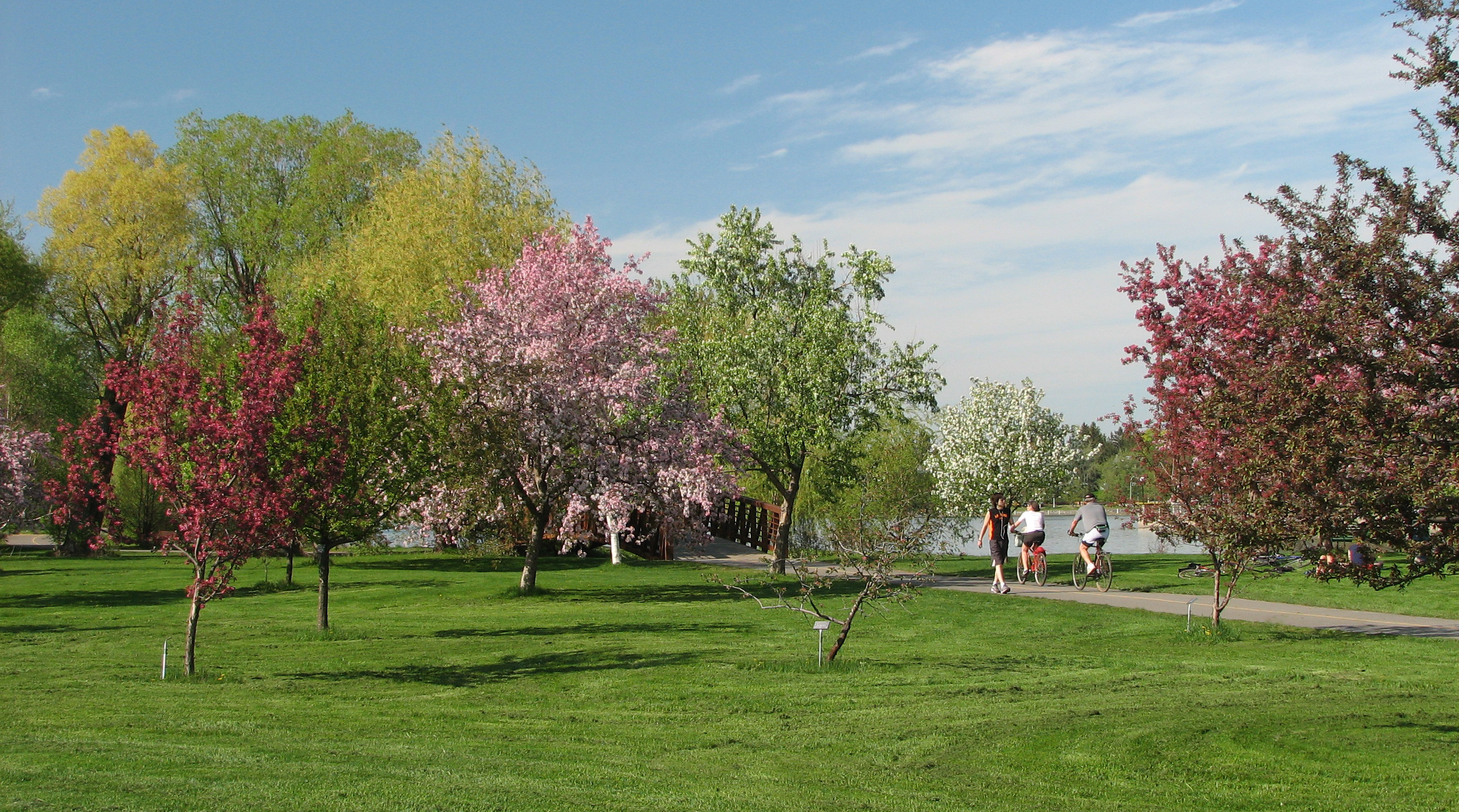 my own stock